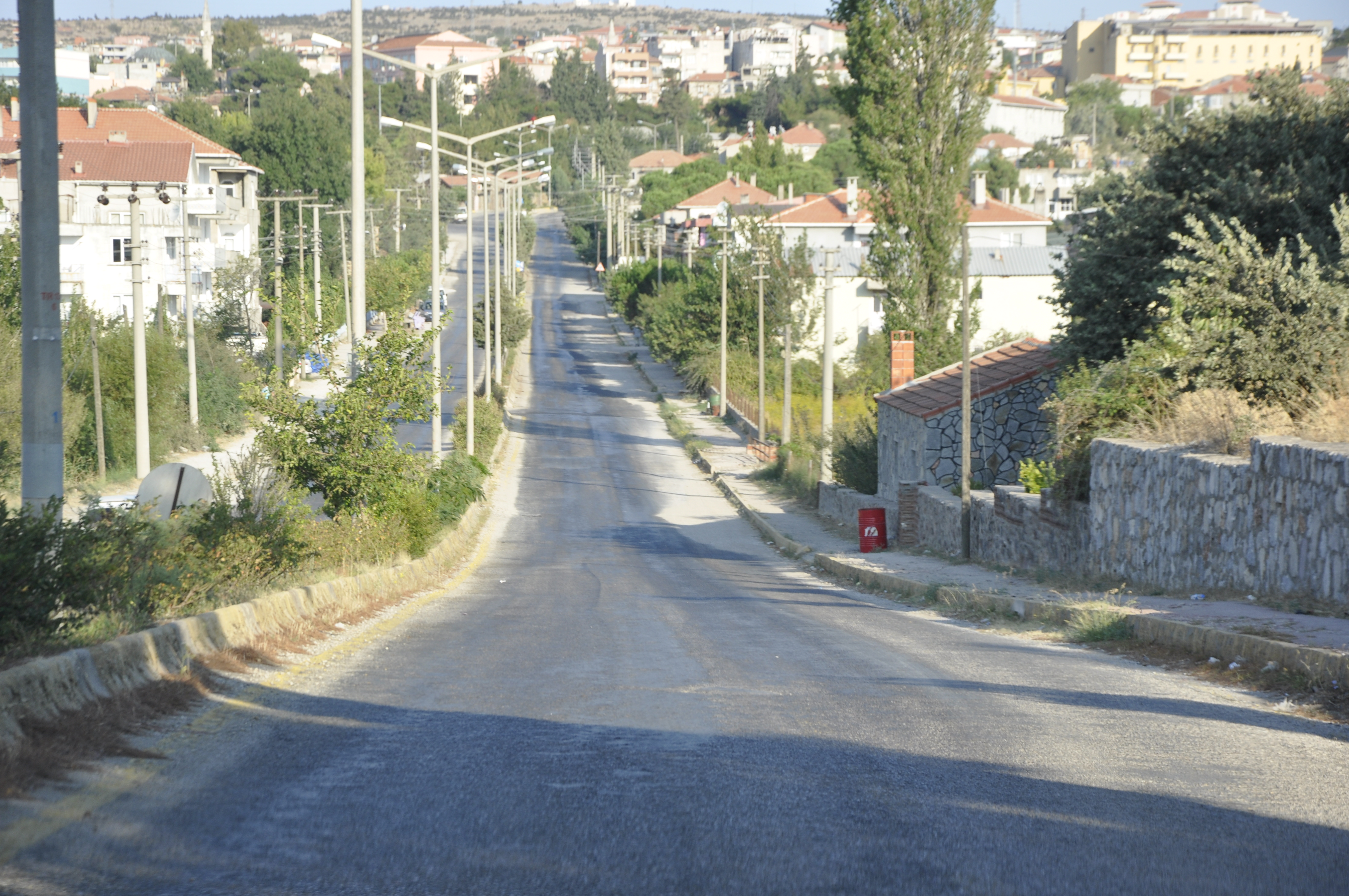 Ayvacık Edremit Caddesi